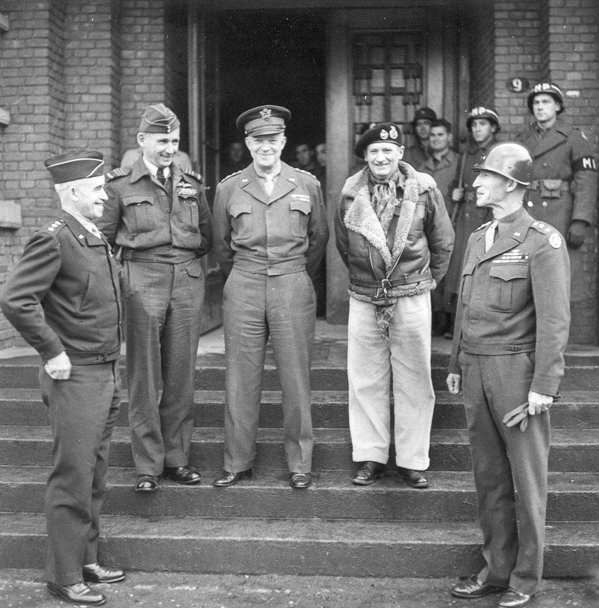 Vijf commandanten van het Westfront op de trappen van het Henric van Veldekecollege in Maastricht (tijdelijk militair hoofdkwartier van het Amerikaanse 9e Leger) na het overleg over het Ardennenoffensief ("Maastricht meeting"), 7 december 1944. V.l.n.r.: Omar N. Bradley (US), Arthur Tedder (GB), Dwight D. Eisenhower (US), Bernard L. Montgomery (GB) en William Hood Simpson (US). Fotocollectie RHCL Maastricht, GAM 4100.